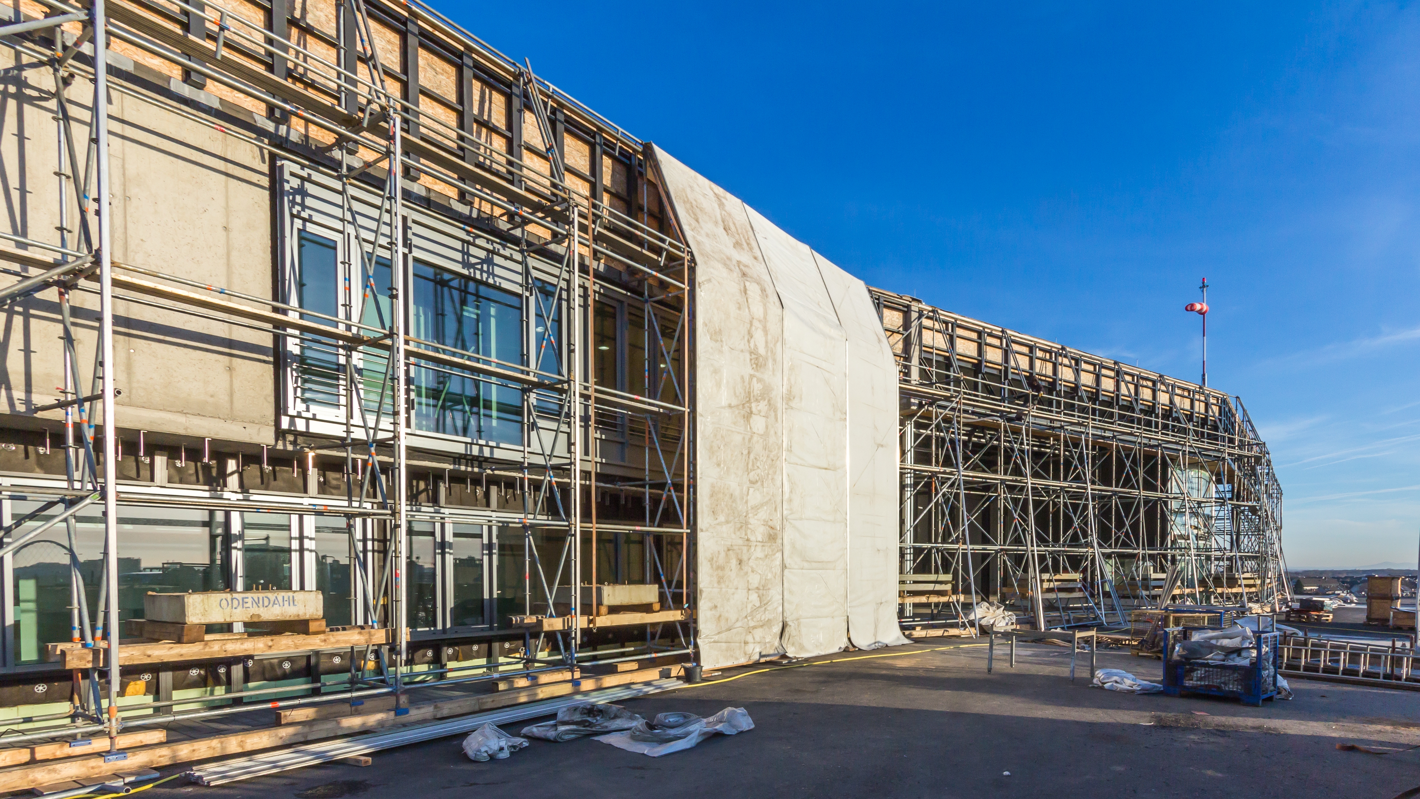 Rettungshubschrauberstation Köln-Kalkberg im Bau. Der hinter der Station errichtete Hügel muss wieder abgetragen werden, da die Last auf den Berg zu hoch ist und es bereits zu Rissen in Bodenplatte und Wände gibt. Foto: Der Hangar wird mit Planen, die über extra aufgebaute Gerüste gehängt werden, winterfest gemacht.